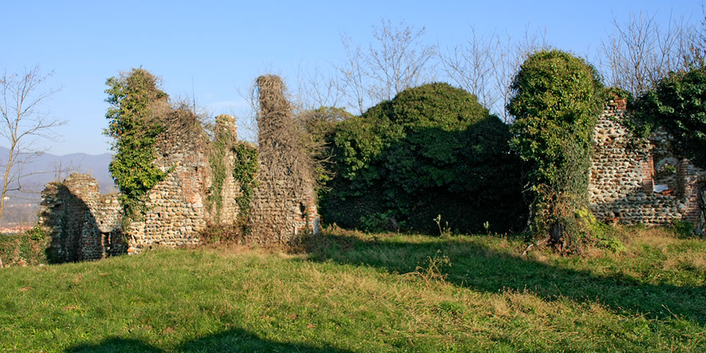 Resti del castelli di Sopramonte a Prato Sesia